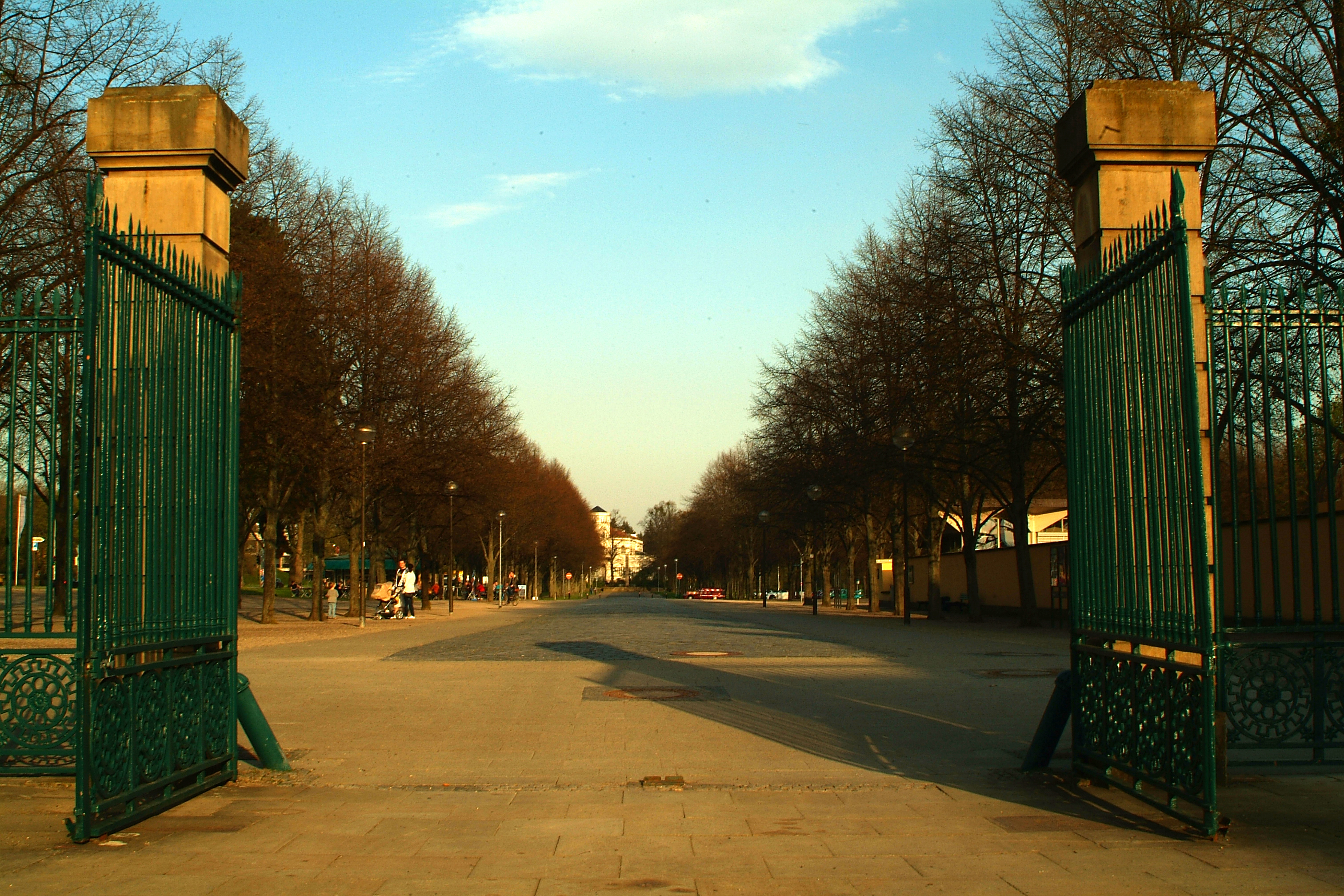 Contre-Allee zwischen Herrenhäuser Schloss und Nienburger Straße Parkhaus – Sie haben ein besses Bild? Sogar ein historisches? Zeigen Sie' s uns. Allen Menschen.